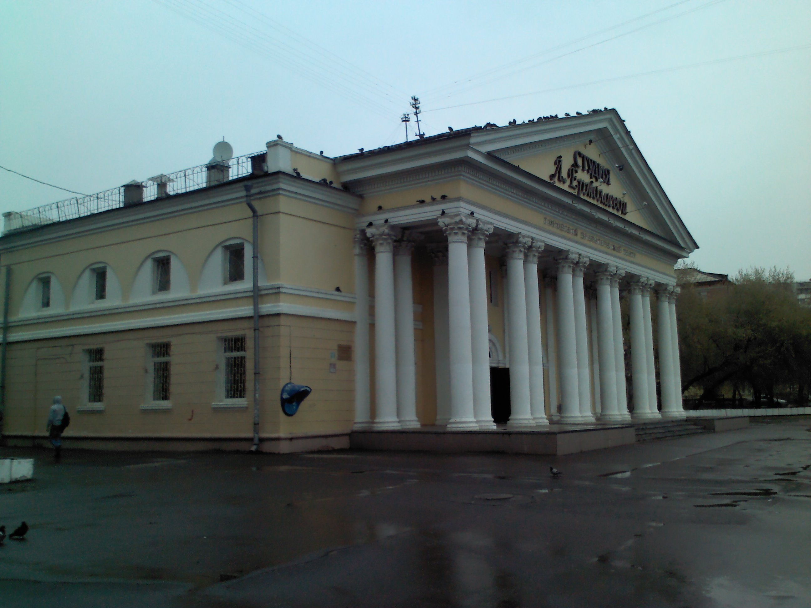 Дом Культуры «Строитель» (Омская область, Омск, Химиков улица, 27)